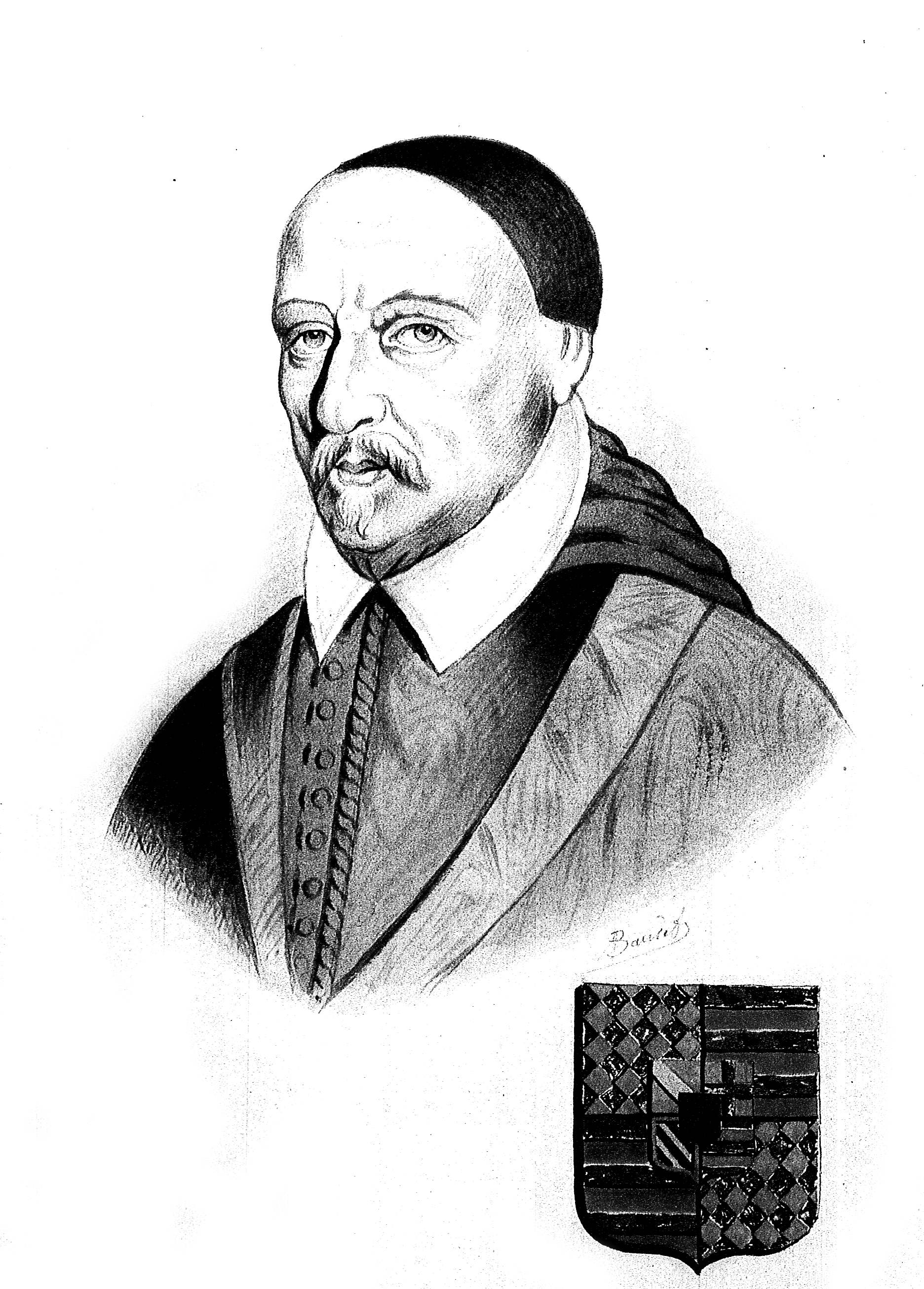 issu du fond iconographique de la bibliothèque d ereims.